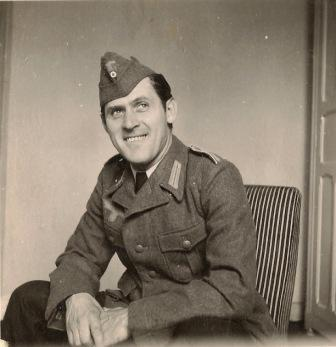 Fotoscan Privatarchiv, Carlo Battisti vermutlich um 1939